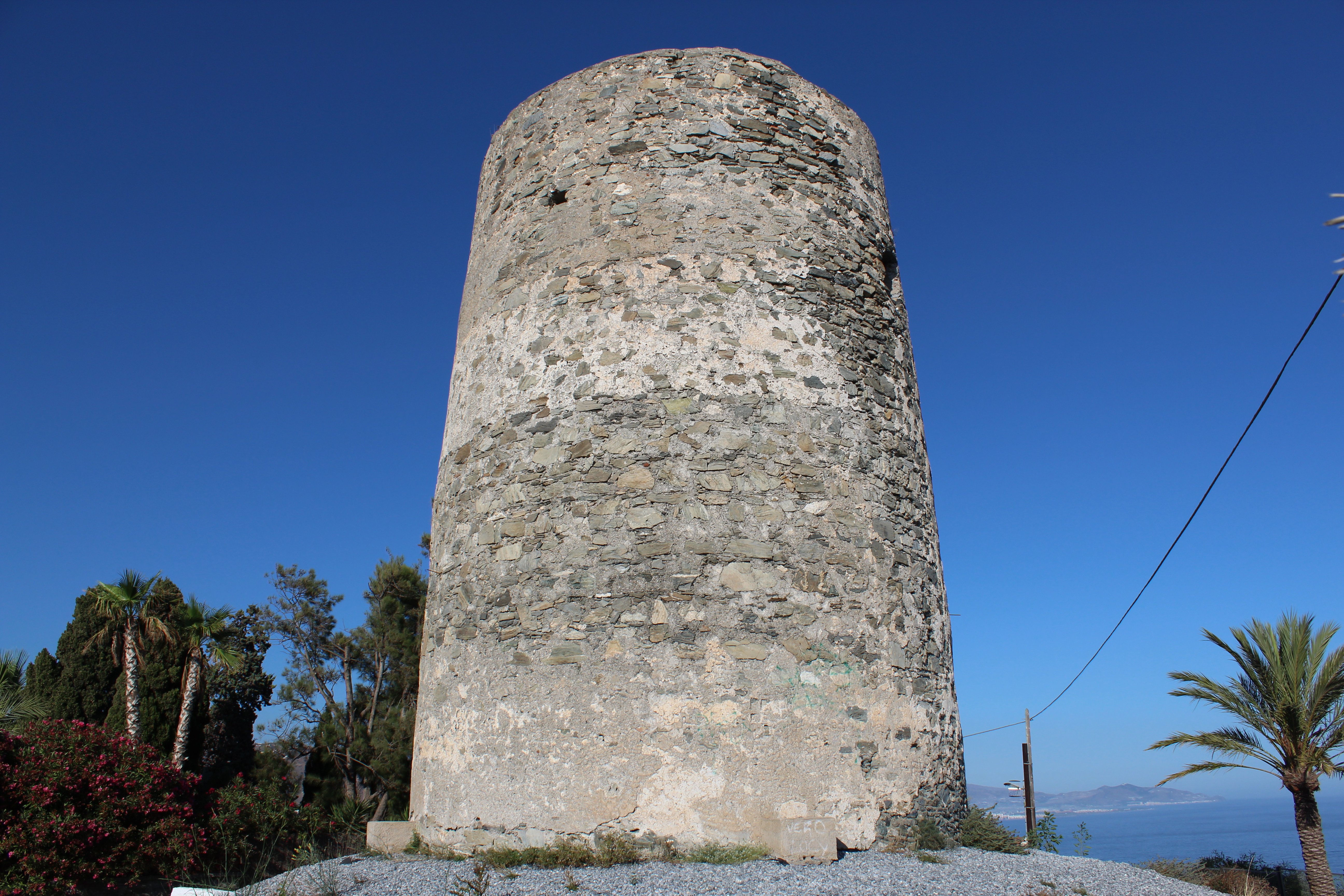 Torre de Velilla, con forma troncocónica.